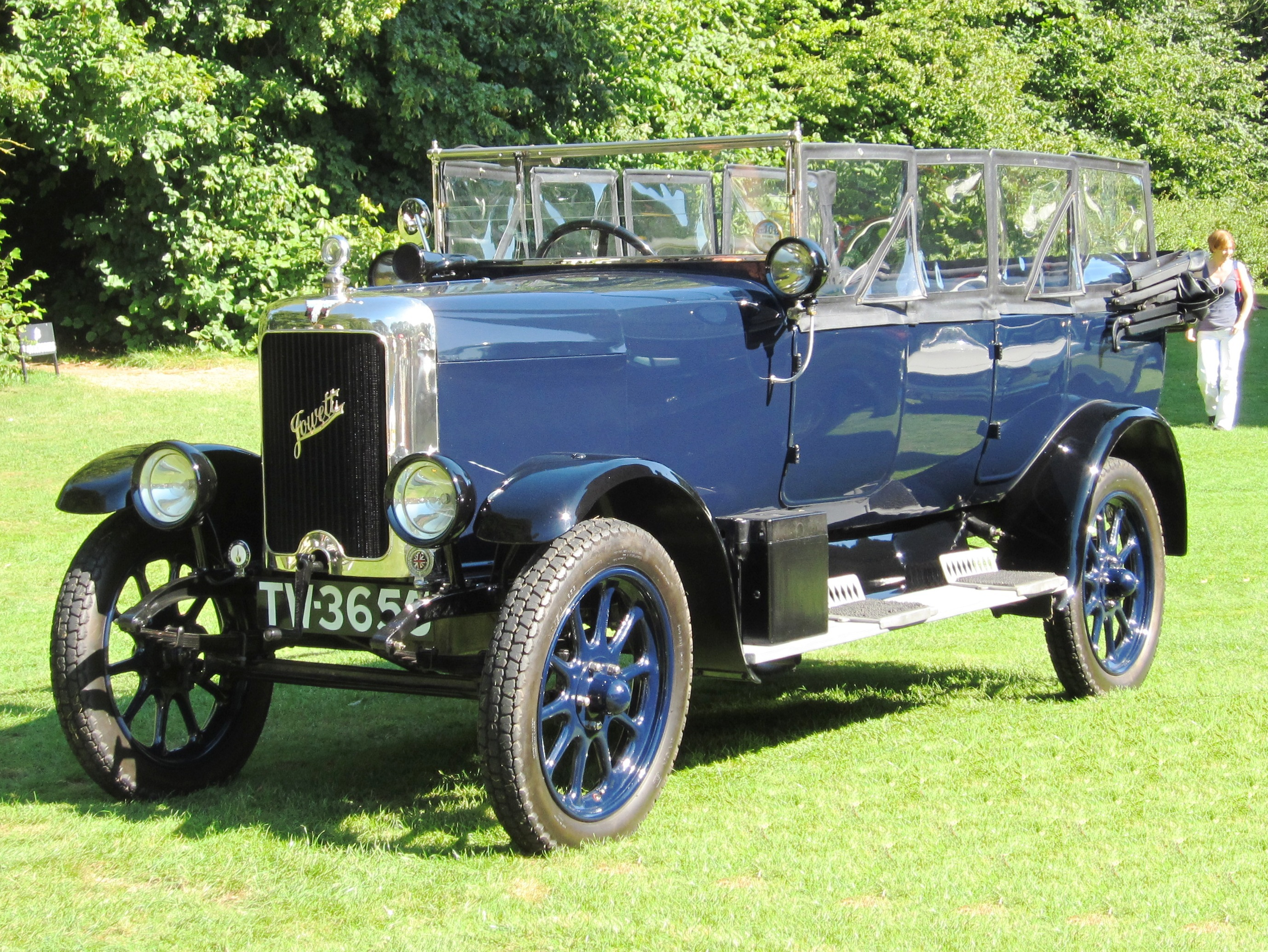 Jowett 7hp Longue 4 1926